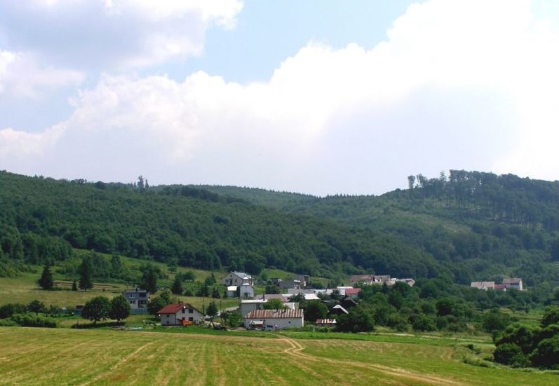 Celkový pohľad